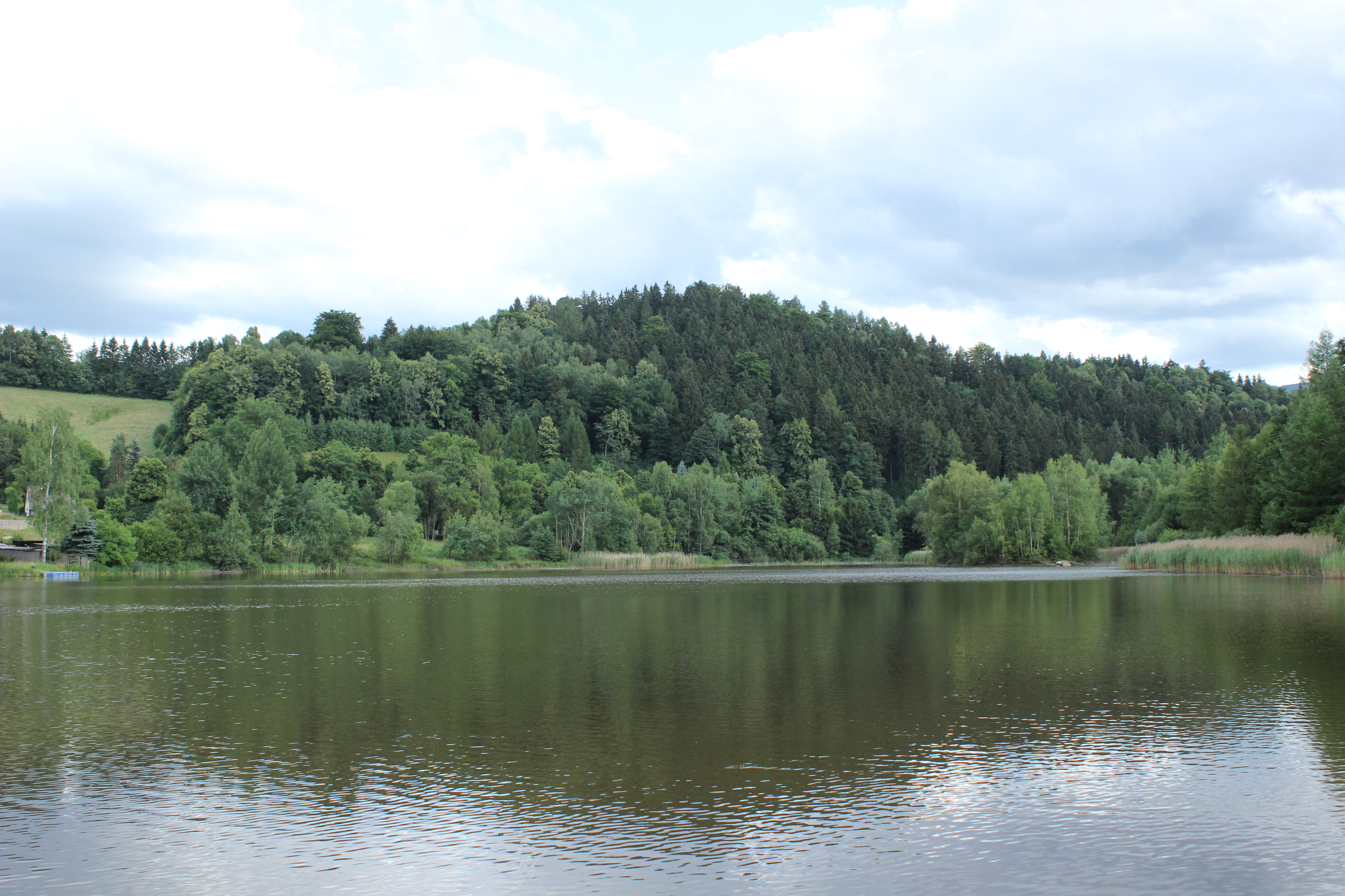 Dubový vrch vypínající se nad Peklem, částí Raspenavy, při pohledu přes rybník Petr.